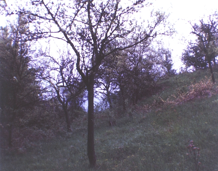 ehem. Burg Oberlauda, Burggraben